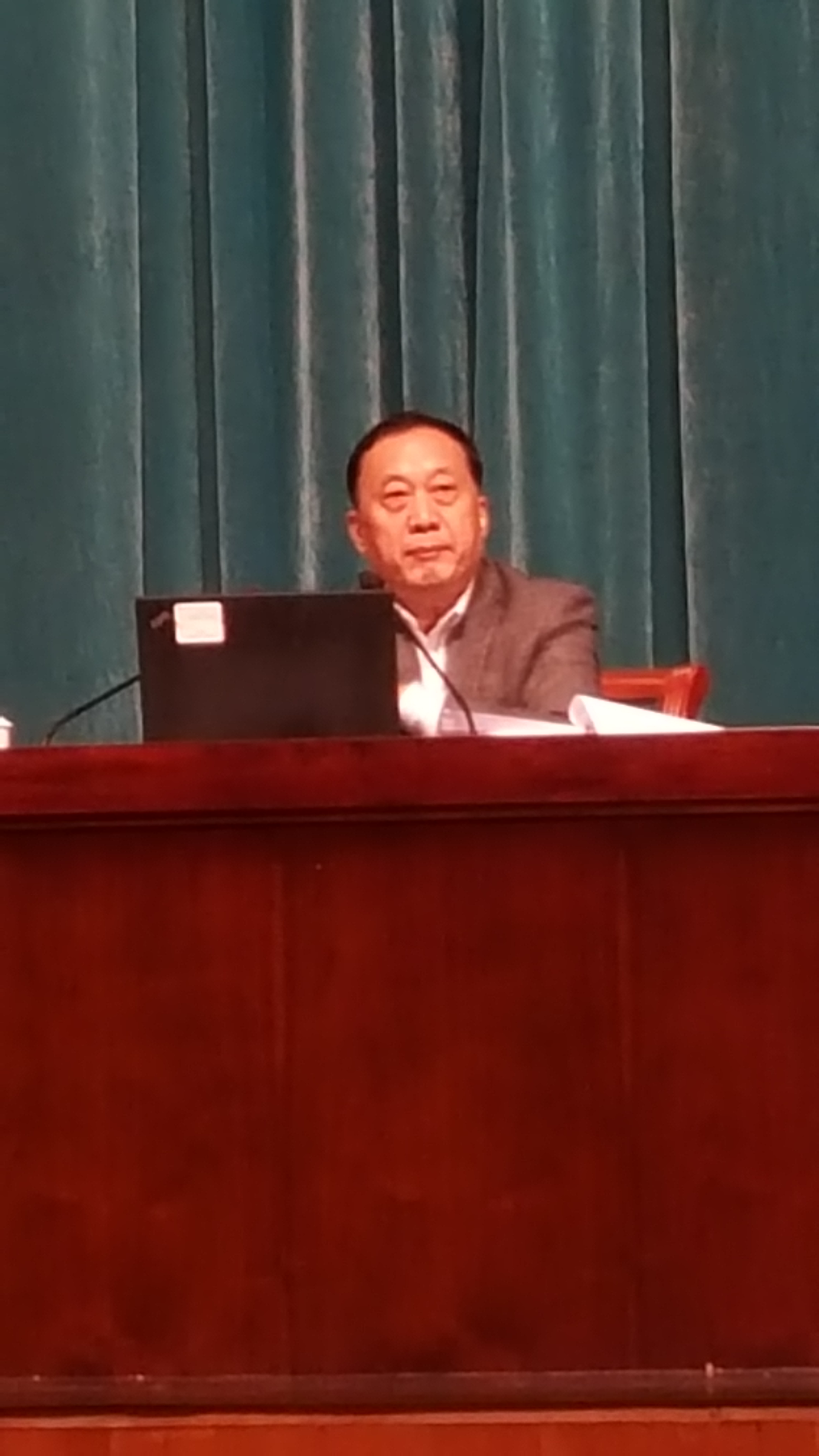 任贤良在北京大学百年讲堂